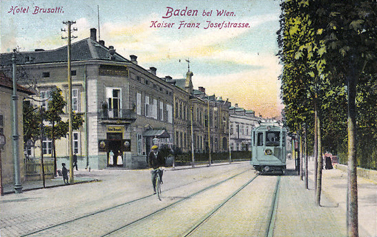 Baden bei Wien, Kaiser-Franz-Joseph-Ring 15, ehemaliges Hotel Brusatti